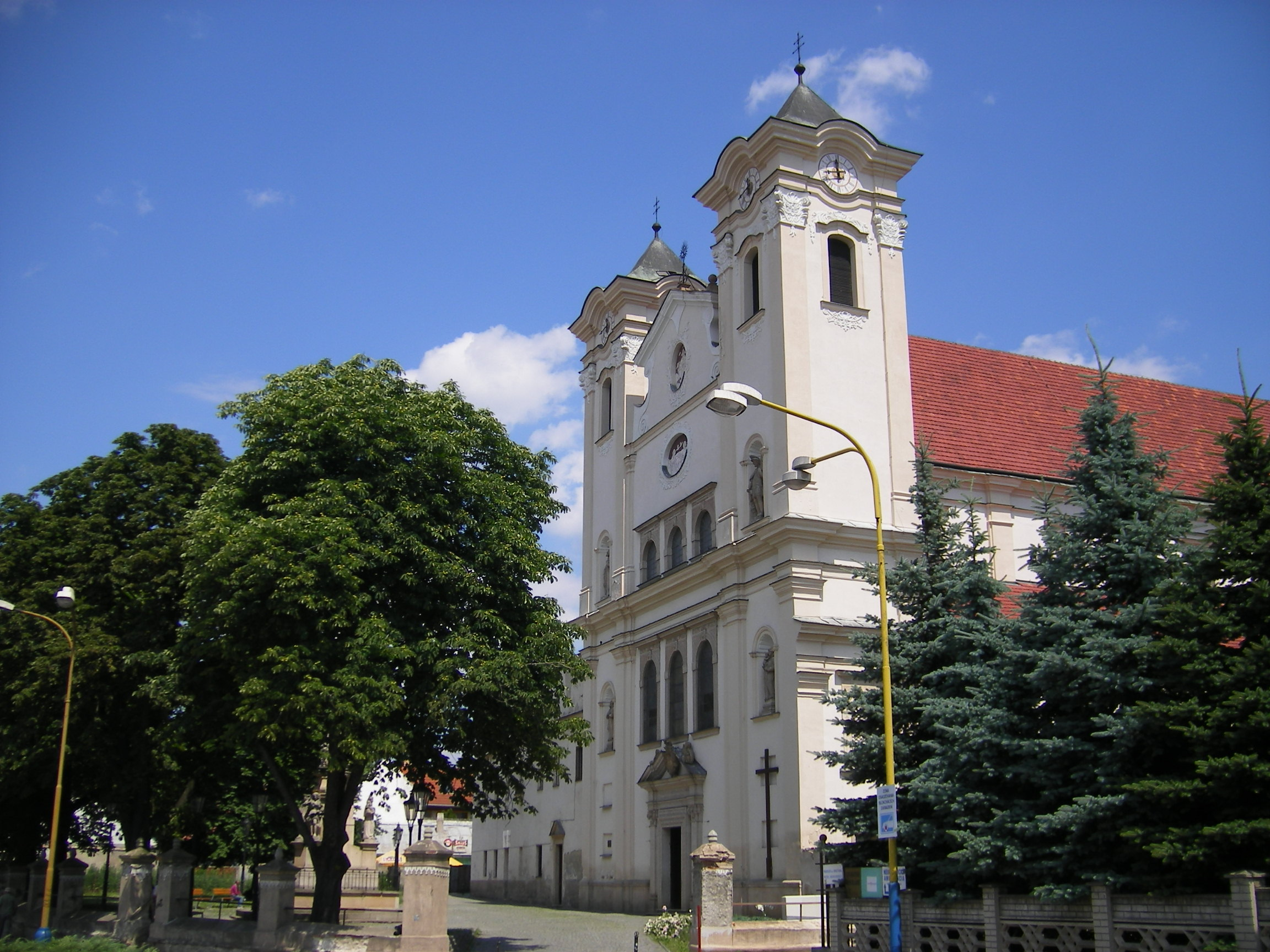 Prešov, Kostoľ Františkánov